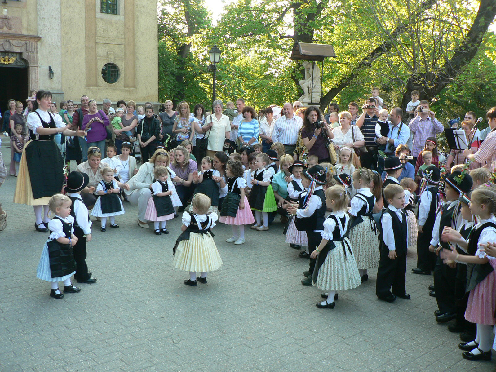 Gyerekműsor májusfaállítás előtt